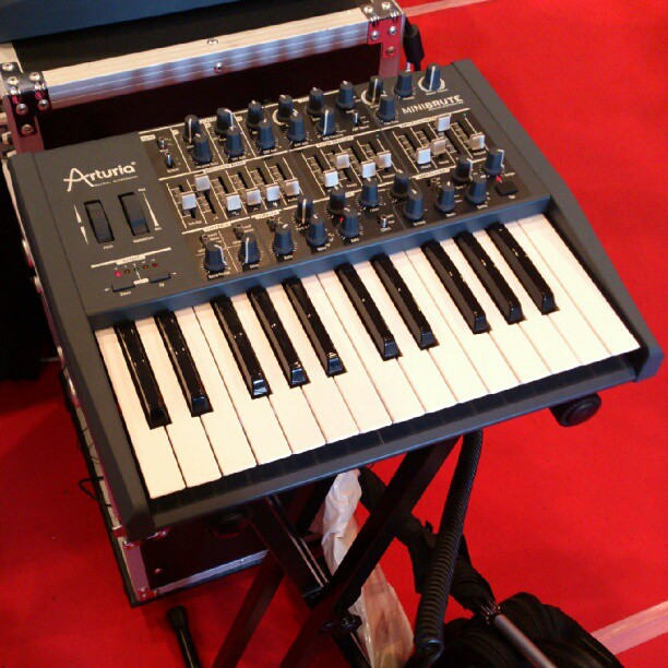 Arturia MiniBrute (2012) Synthesizer Festa 2012 in Shinjuku